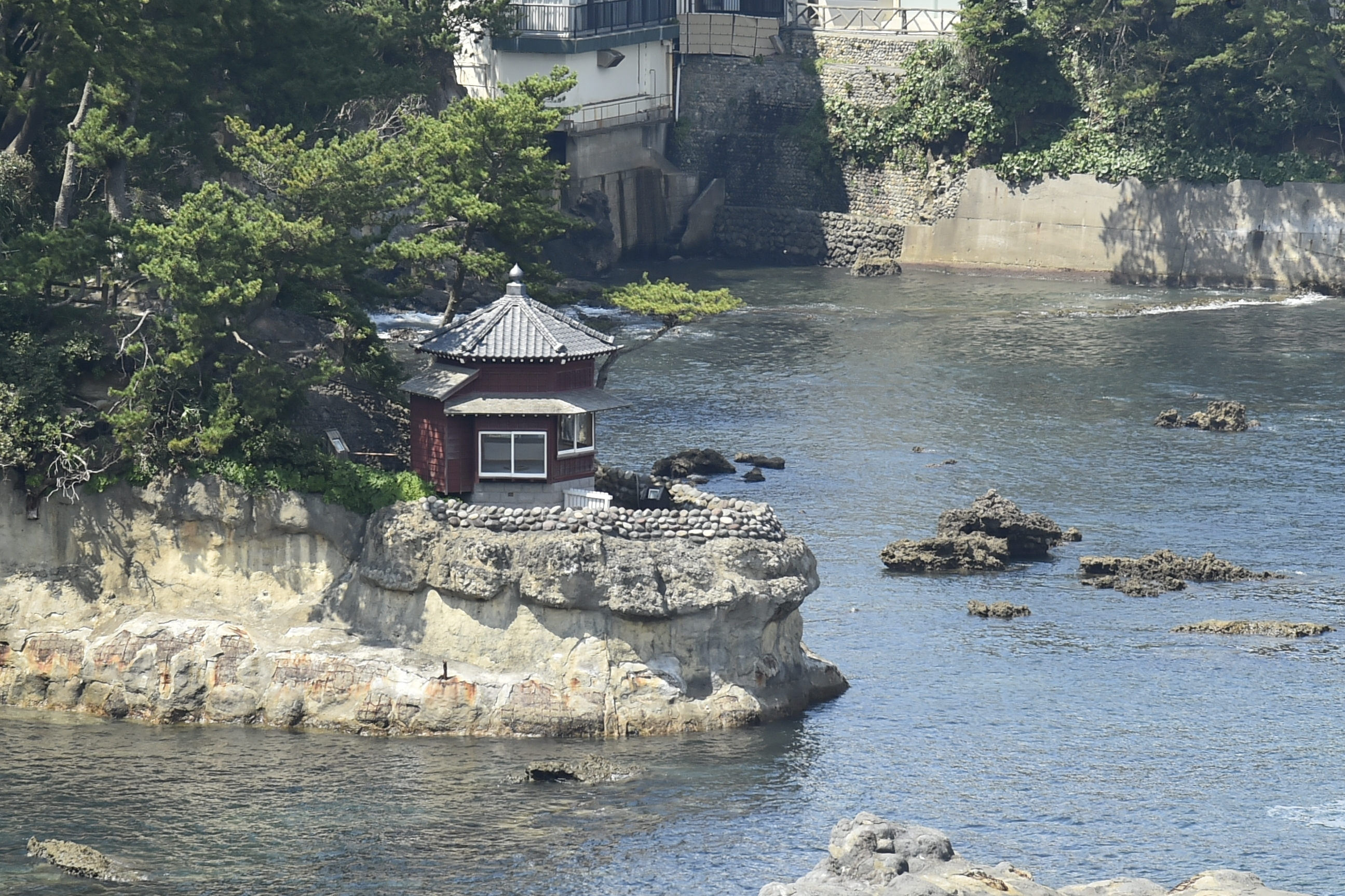 海から見た再建後の六角堂（北茨城市）2020年8月